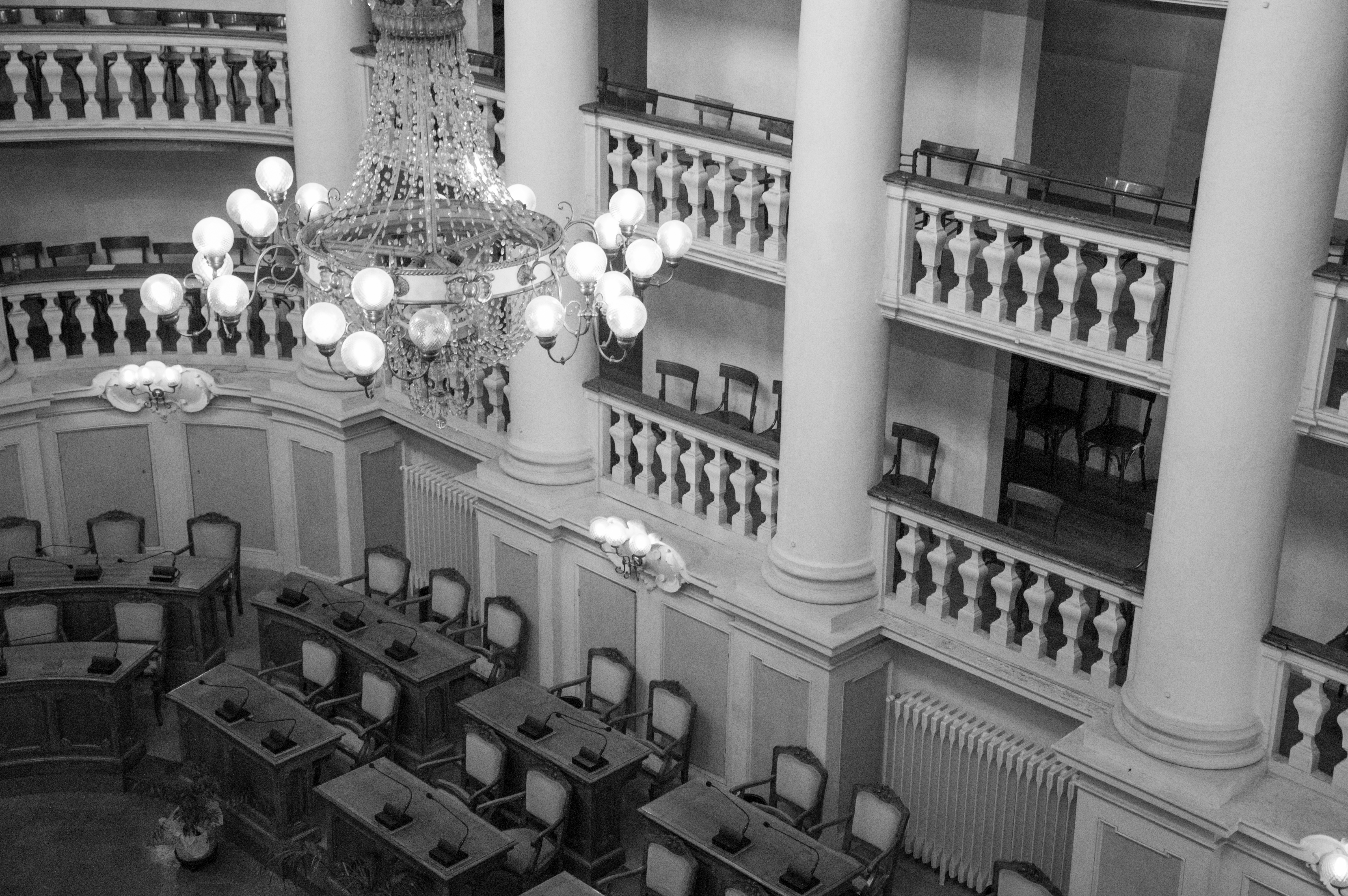 Palazzo Municipale This is a photo of a monument which is part of cultural heritage of Italy.